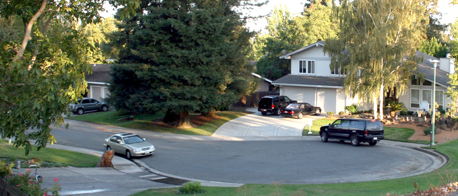 A cul-de-sac in Sacramento, CA